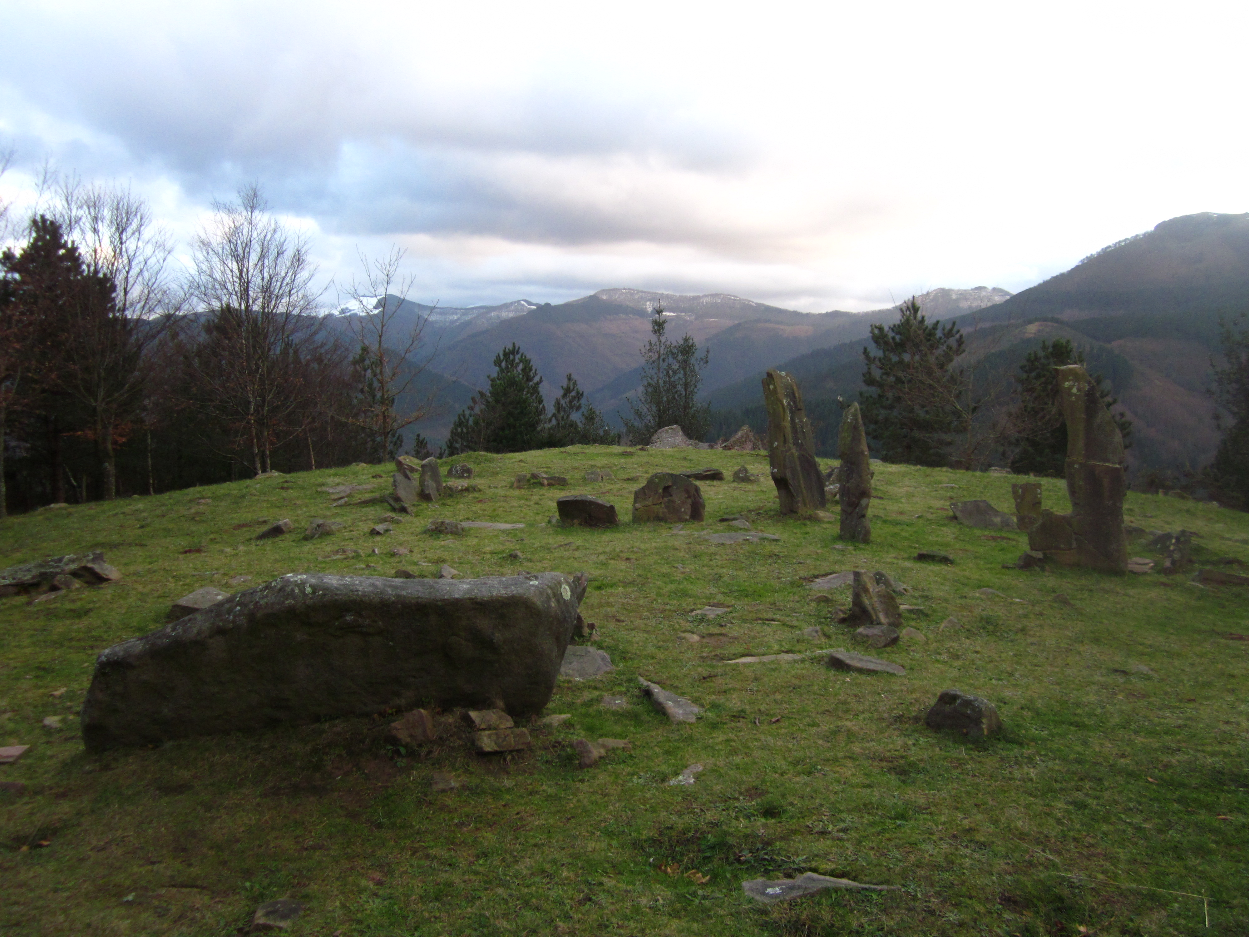 Paysage á Mulisko Gaina.